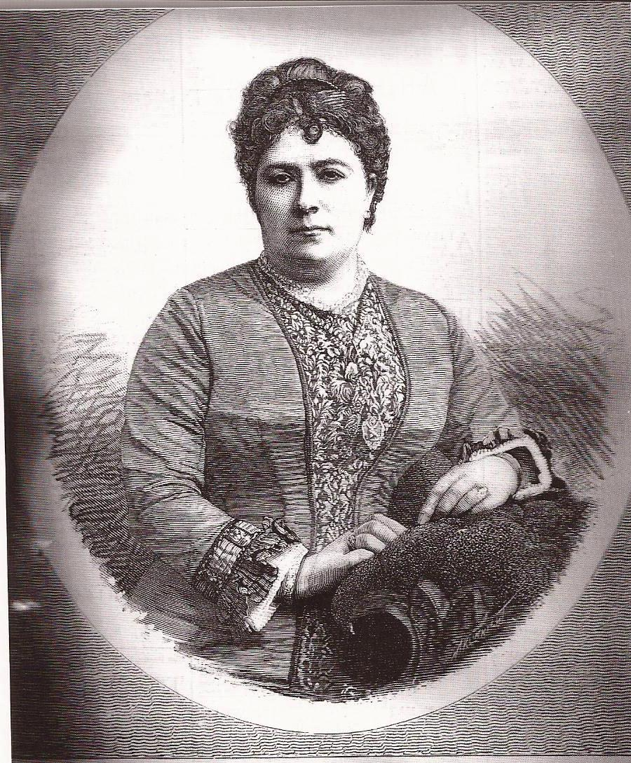 Carolina Casanova de Cepeda (1847 - 1910)